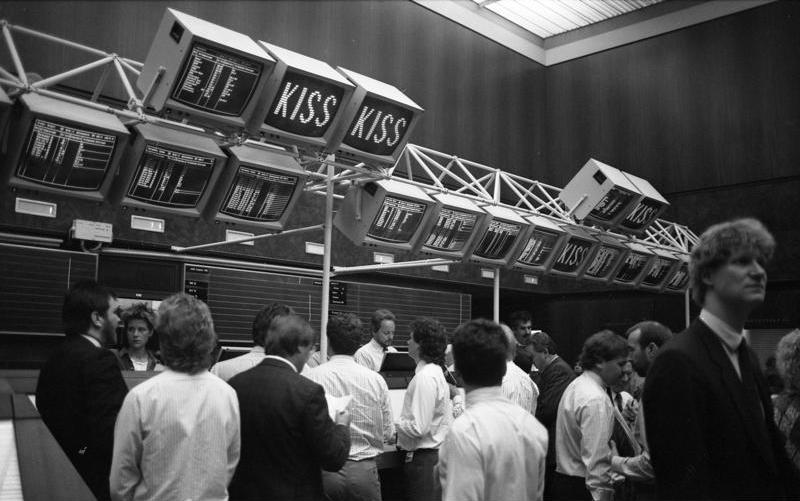 Juni 1988 Frankfurt am Main Börse, mit Informationssystem "Kiss"